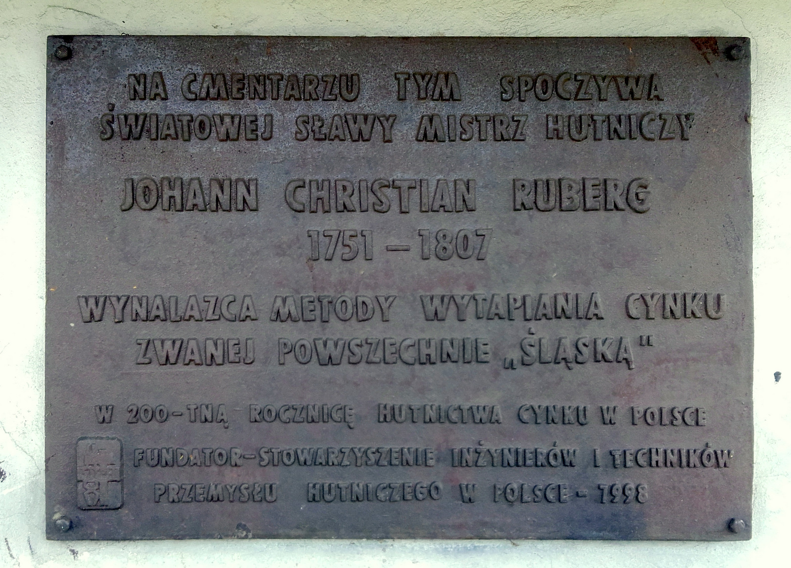 Tablica poświęcona pamięci wynalazcy śląskiej metody wytopu cunku Johannowi Christianowi Rubergowi w Hołdunowie